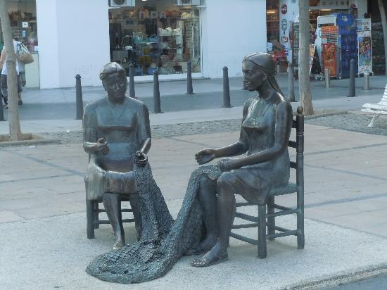 Estatua de las remendadoras de las redes de pescadores. Puerto de Cambrils